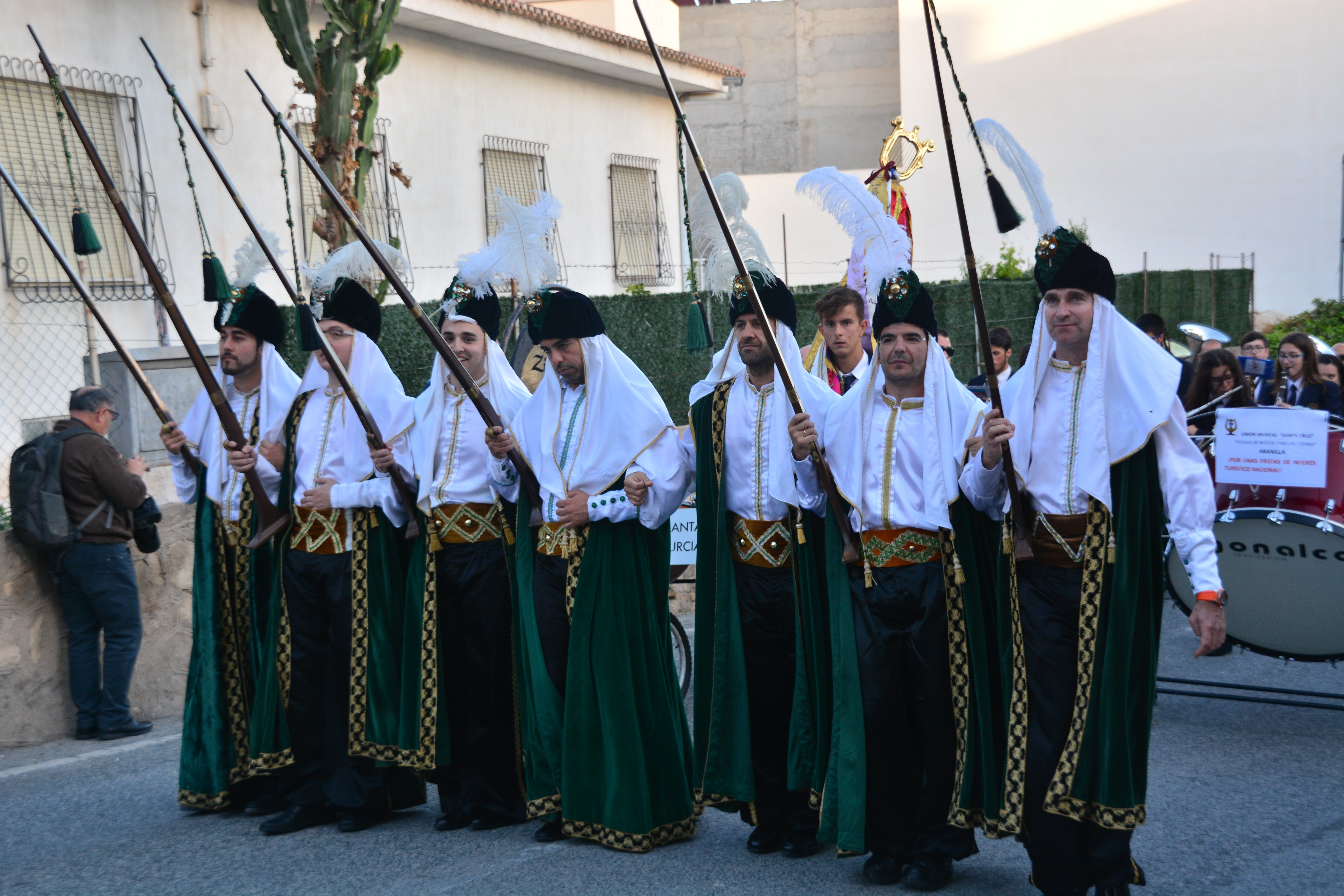 Moros y Cristianos de Abanilla This is a photography of a Folklore festival in Spain (Wikidata id Q23660880).